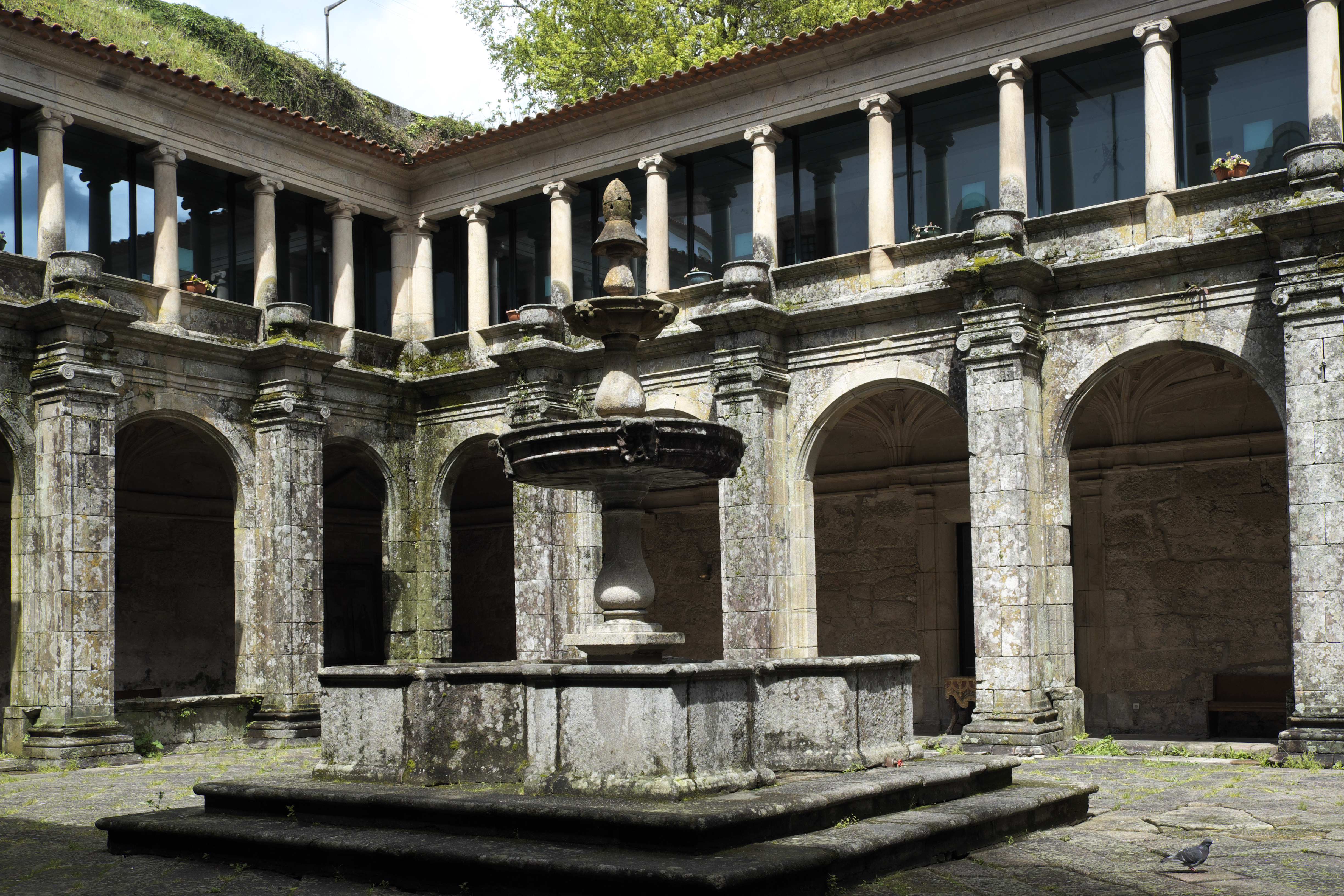 Klosterkirche São Gonçalo in Amarante im Distrikt Porto (Nordportugal), Kreuzgang